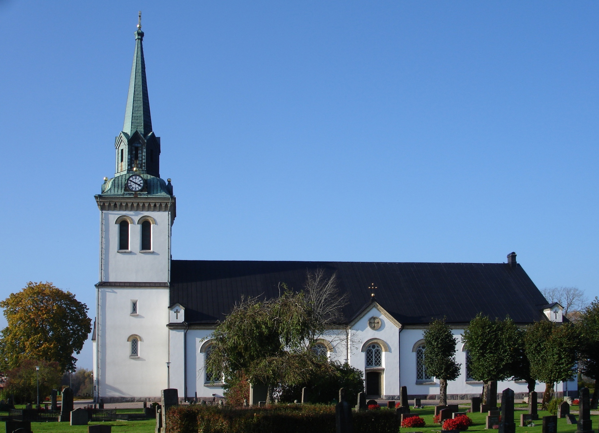 Torups kyrka, Halland, Göteborgs stift